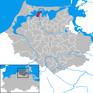 Pruchten in Mecklenburg-Vorpommern - District Nordvorpommern